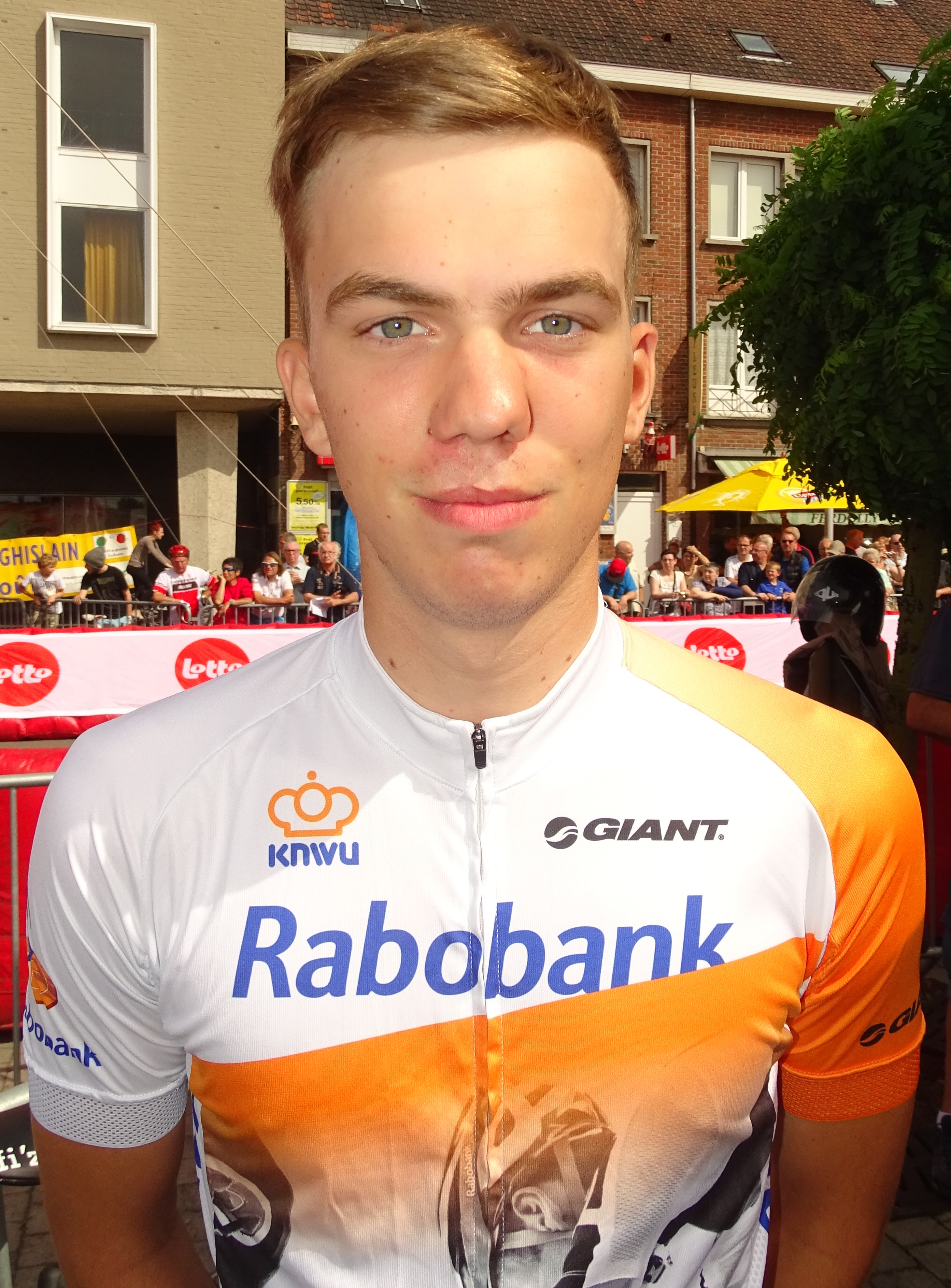 Reportage réalisé le mercredi 22 juillet à l'occasion du départ du Grand Prix Pino Cerami 2015 à Saint-Ghislain, Belgique.